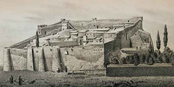 Saint Catherine's Monastery, Mount Sinai (Литография рисунка монастыря святой Екатерины (Синай) из из альбома архимандрита Порфирия Успенского))